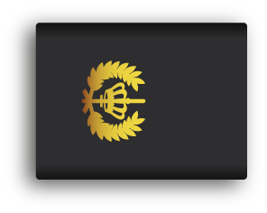 Rangen van de Nederlandse politie, epauletten (schuifpassanten) t.b.v. het huidige en het nieuwe (na 2014) uniform.